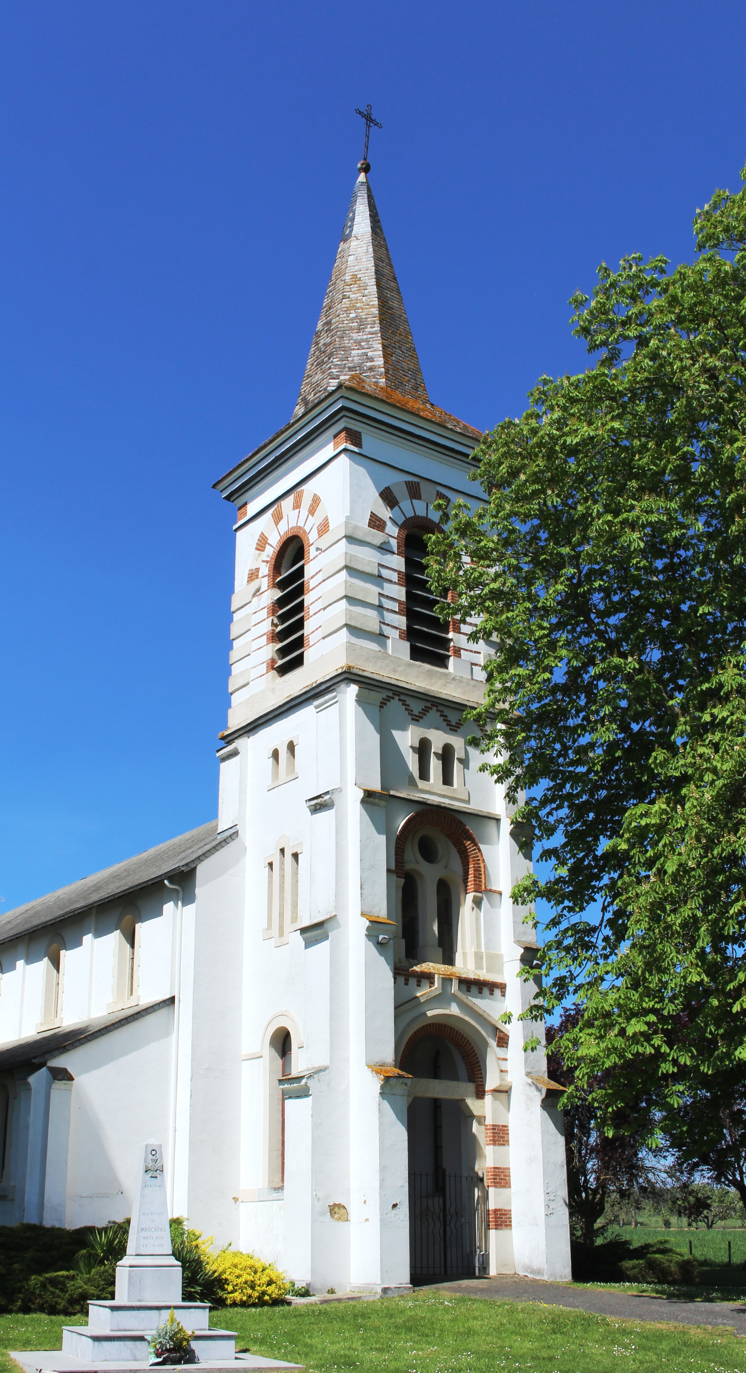 Église Saint-Pierre-et-Saint-Paul de Mascaras (Hautes-Pyrénées)